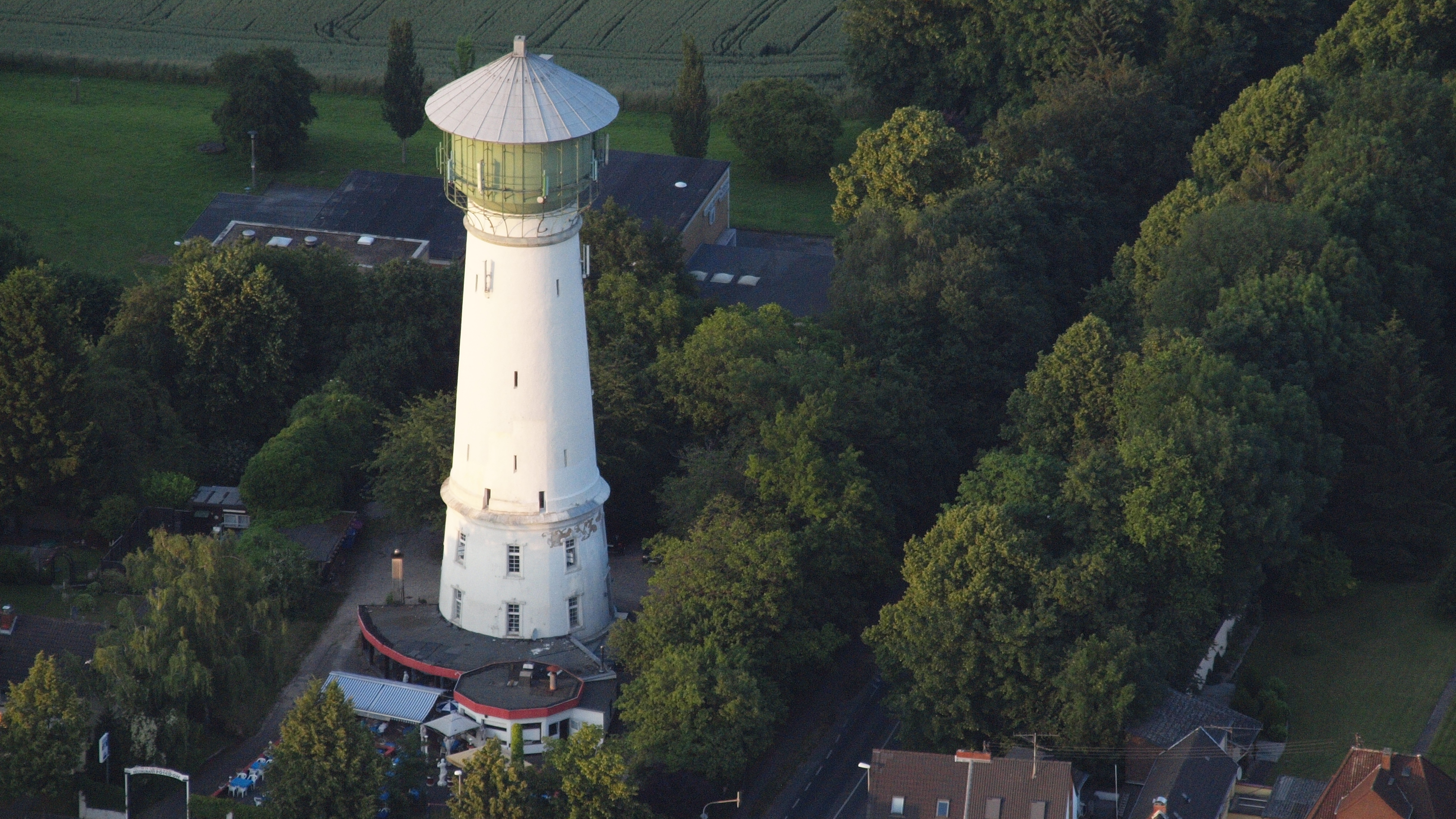 Berzdorf, Wasserturm, Langenackerstraße, Luftaufnahme (2014)